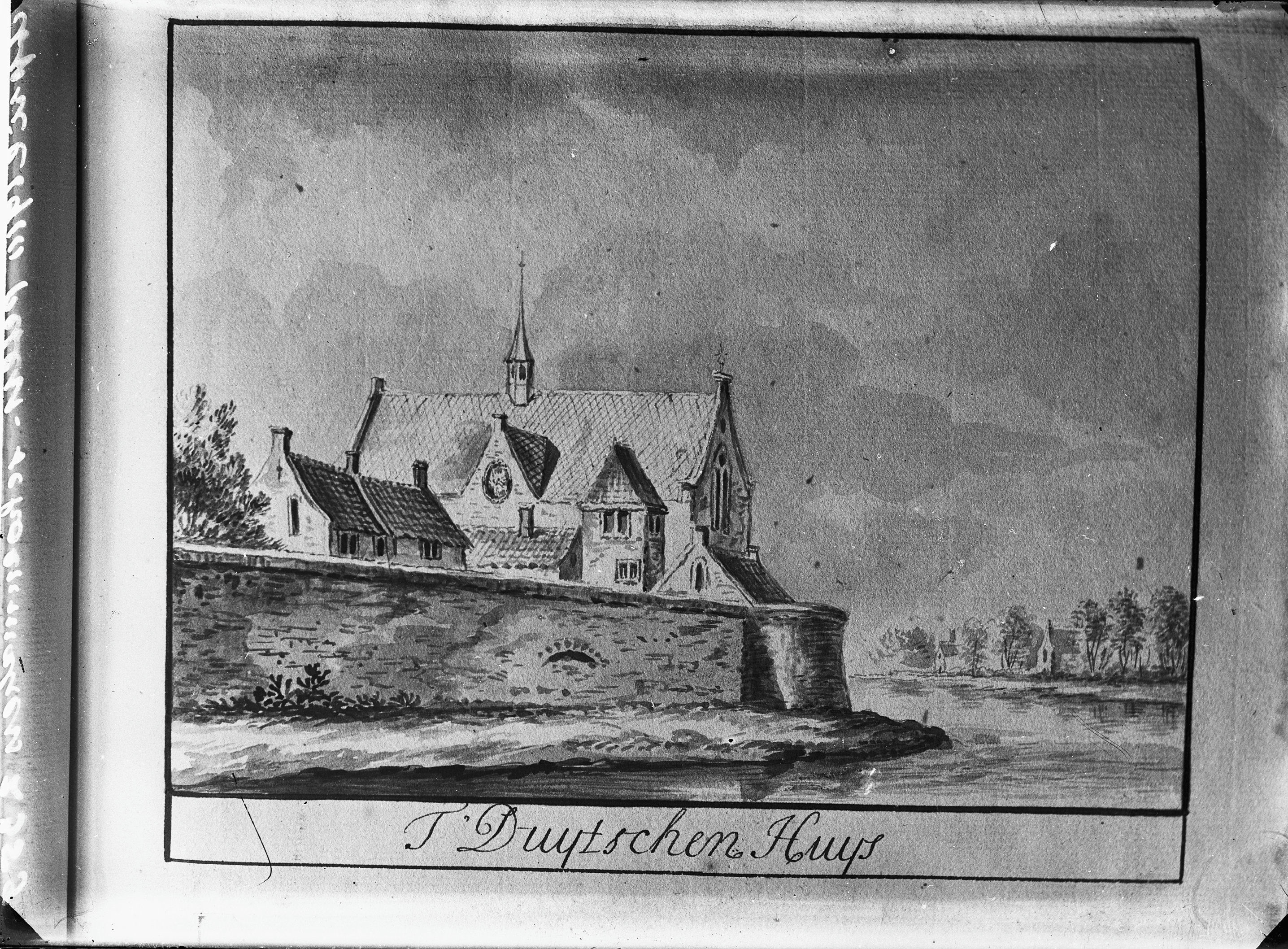 Duitse Huis: tekening